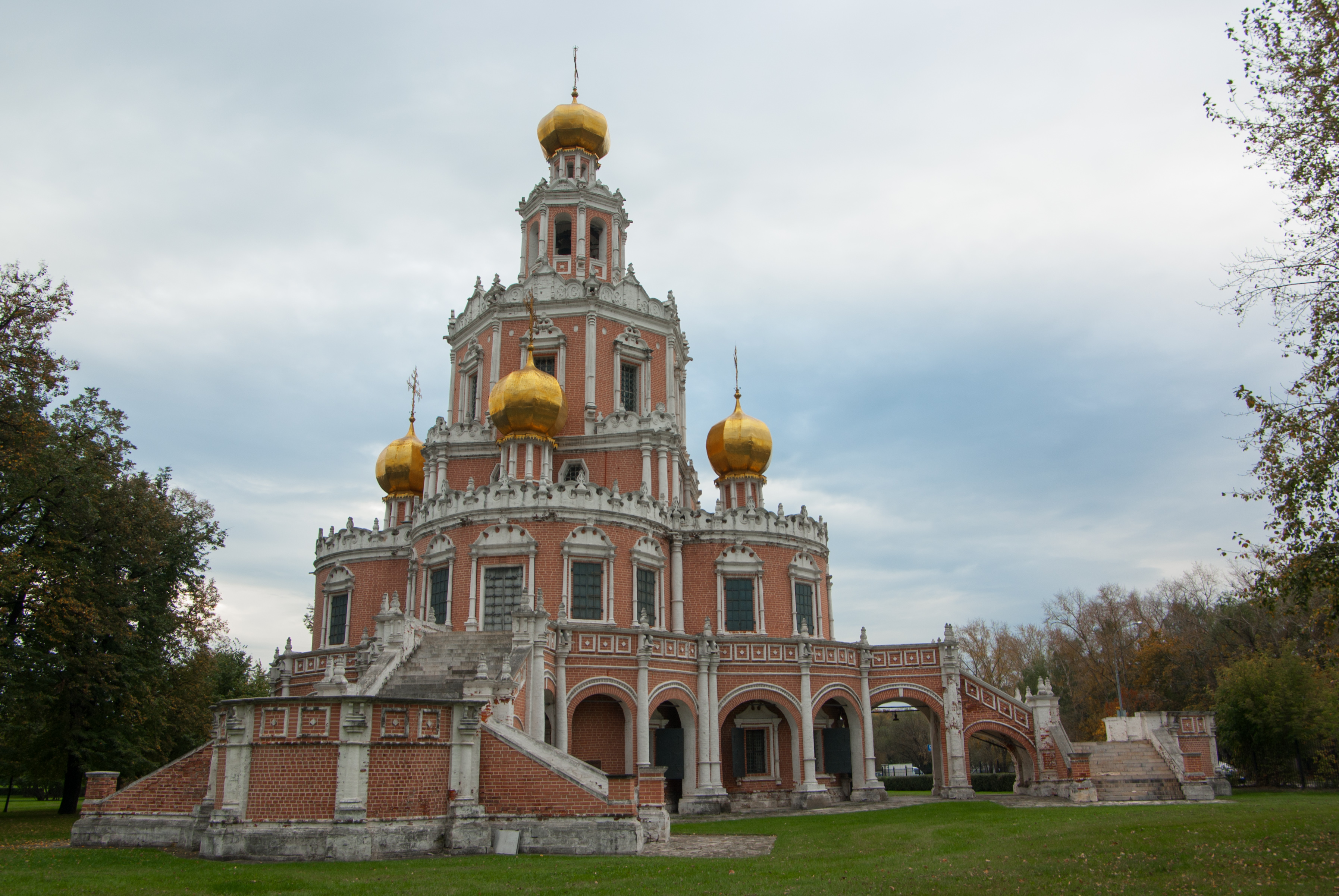 Фотография современного состояния Церкви Покрова Пресвятой Богородицы в Филях